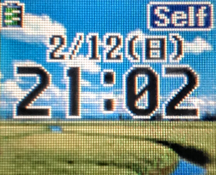 FOMA史上初のフルカラーのサブディスプレイです